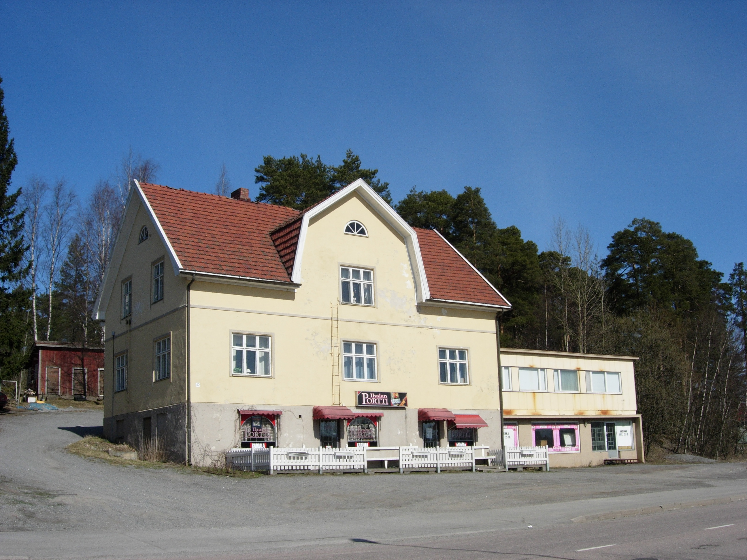 Ihalan Portti, Ihalantie 42, Ihala, Raisio.